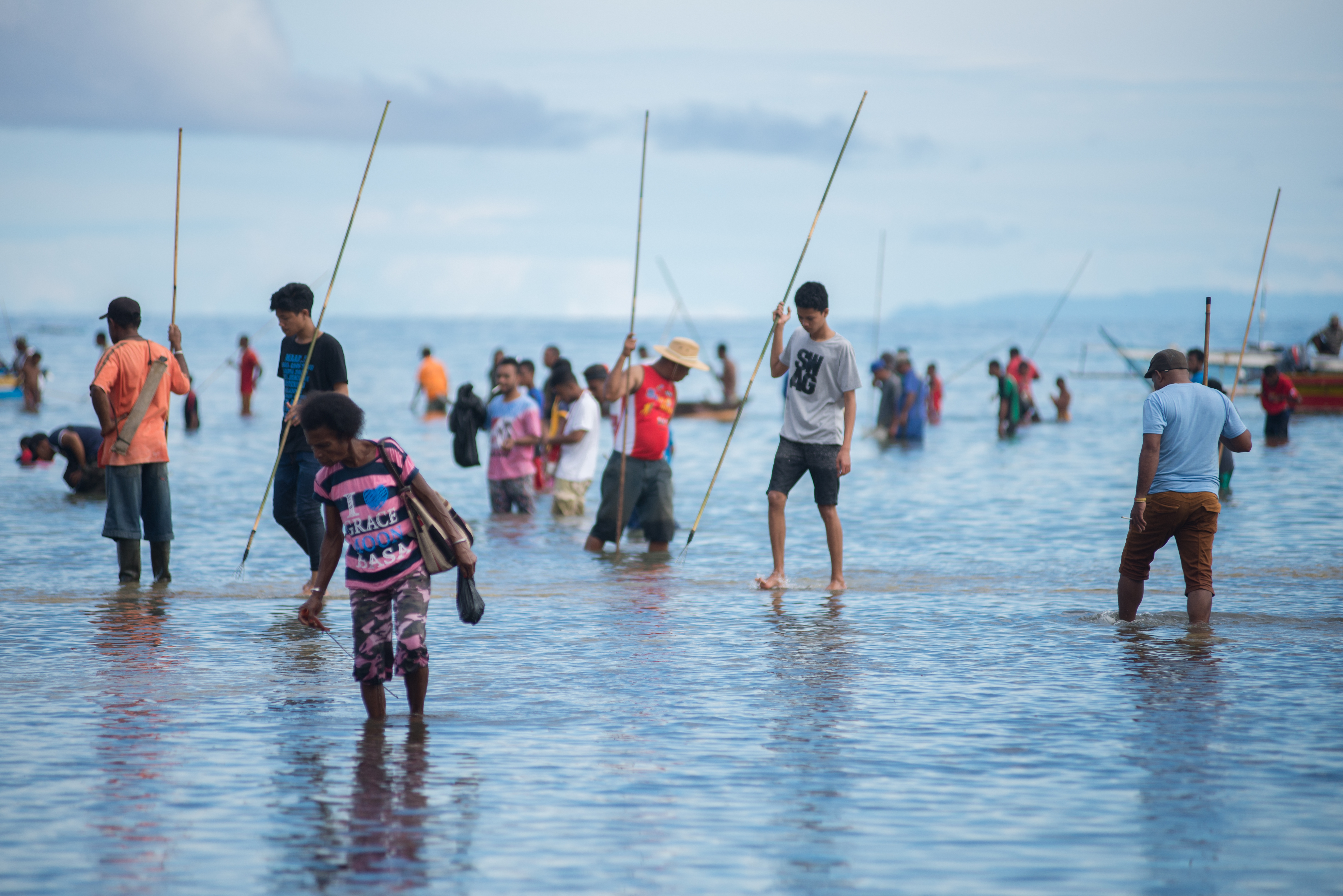 snap mor